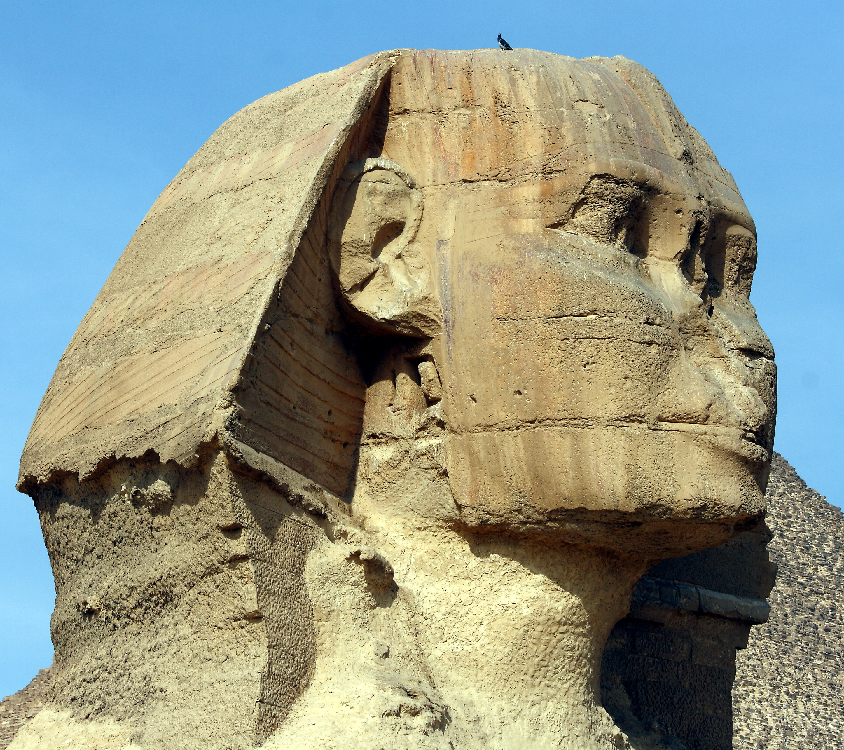 Große Sphinx von Gizeh